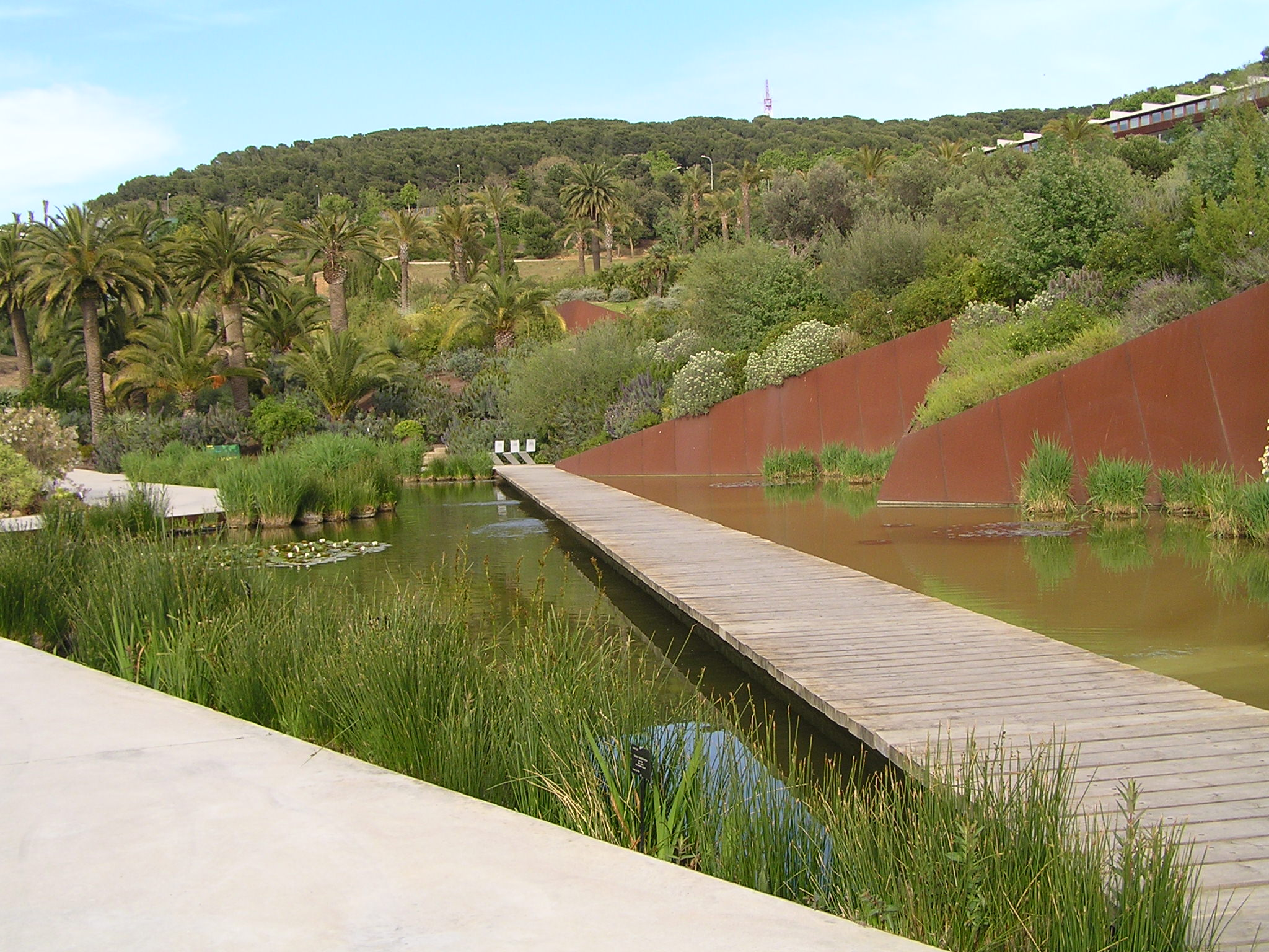 jardin botanique de Barcelone